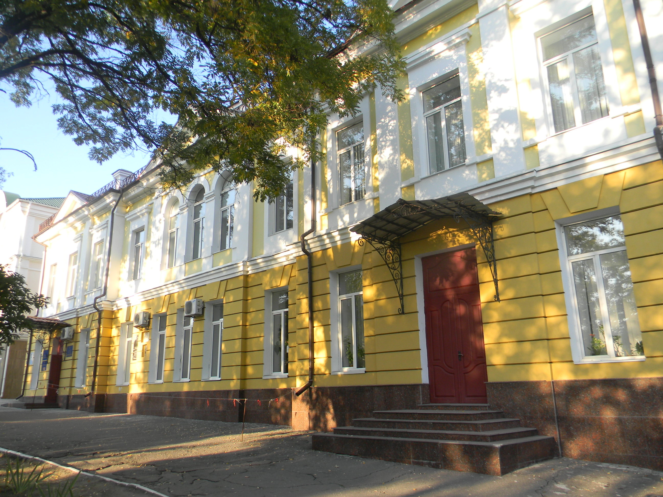 Будинок, у якому в 1891 році зупинявся Максим Горький, Херсон, пр-т Ушакова, 16